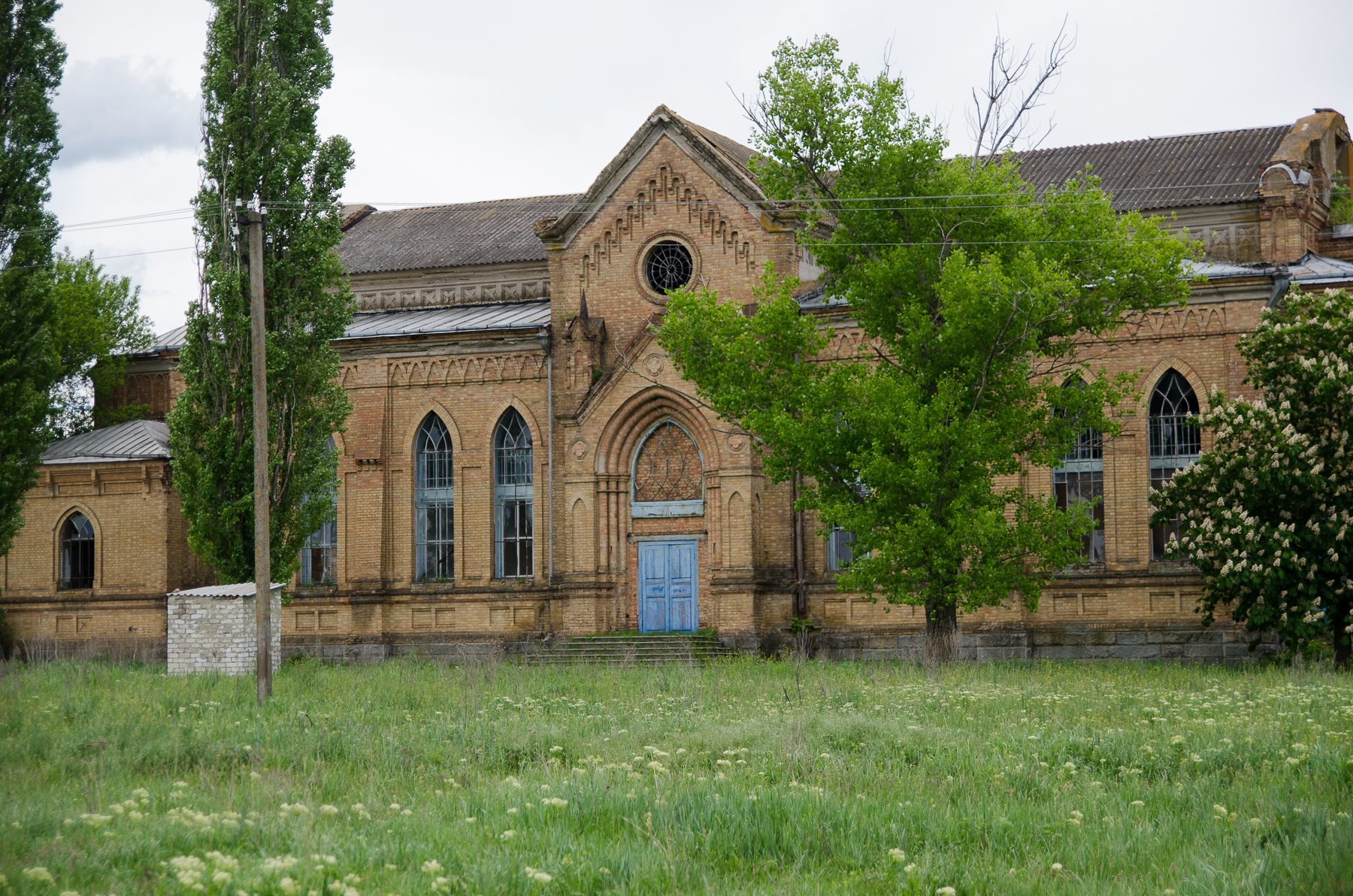 Кірха, С. Терсянка